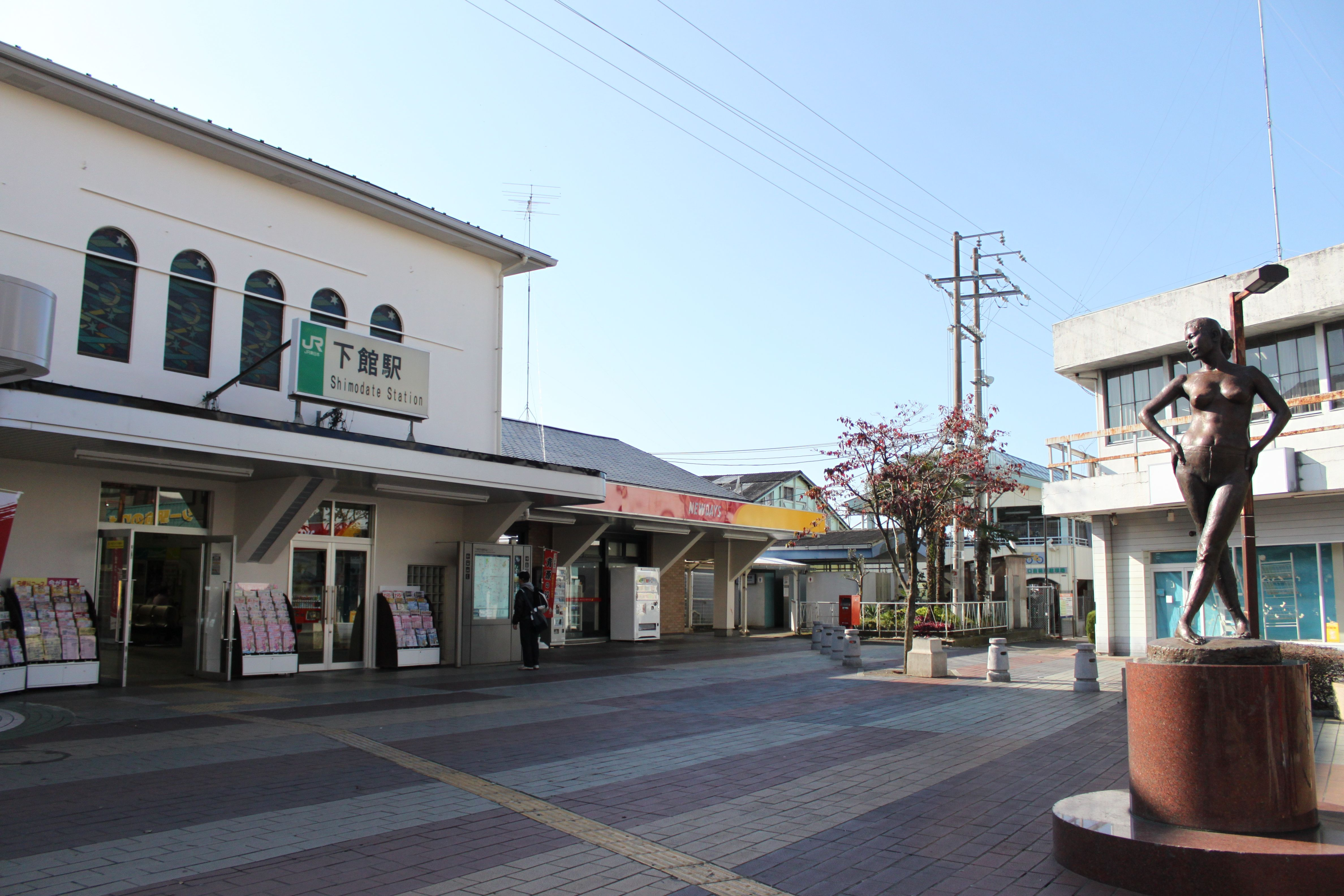 下館駅